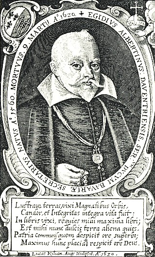 Kupferstich des bayrischen Hofsekretärs und Schriftstellers Aegidius Albertinus.